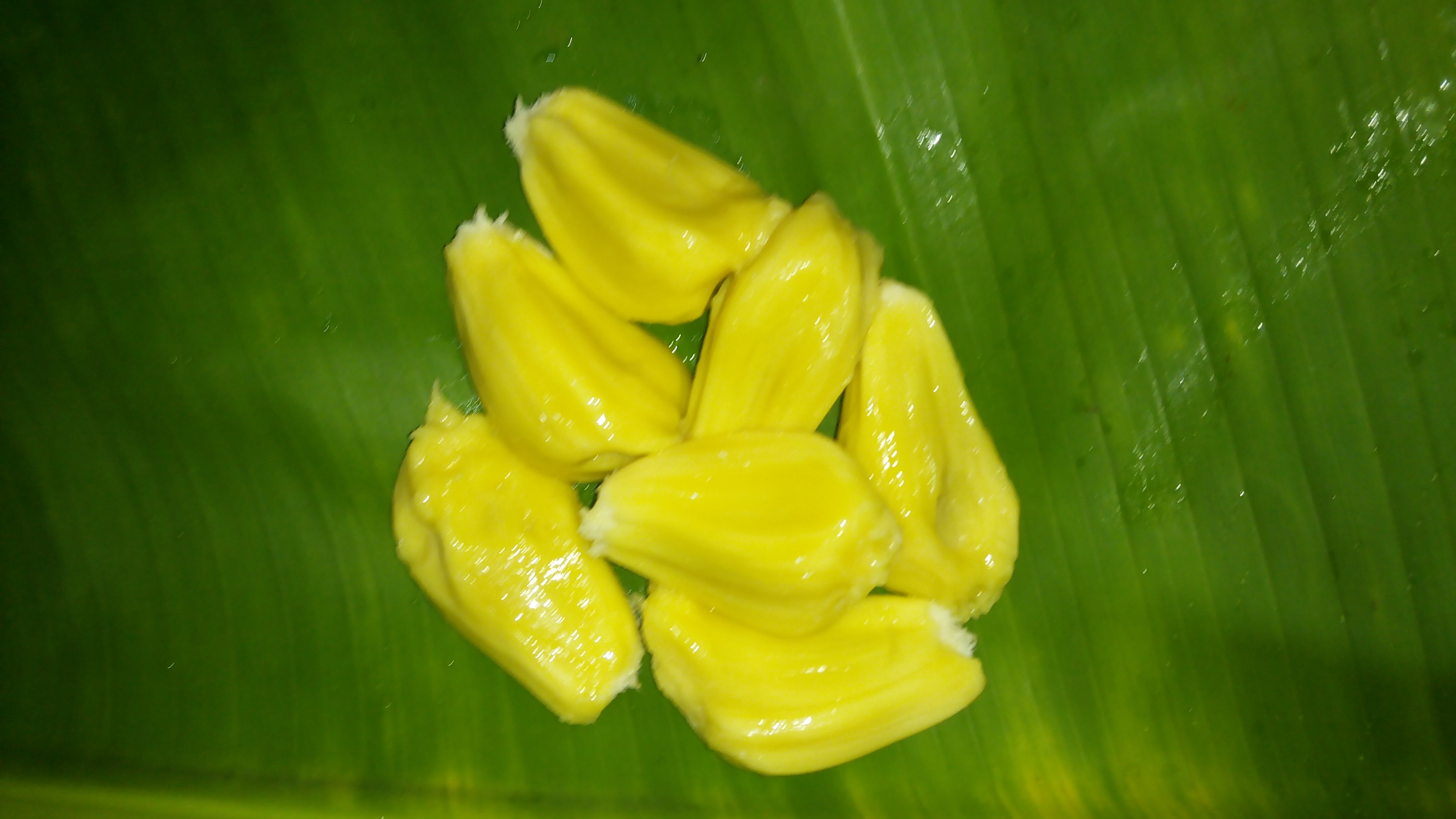 फणसाचे गरे